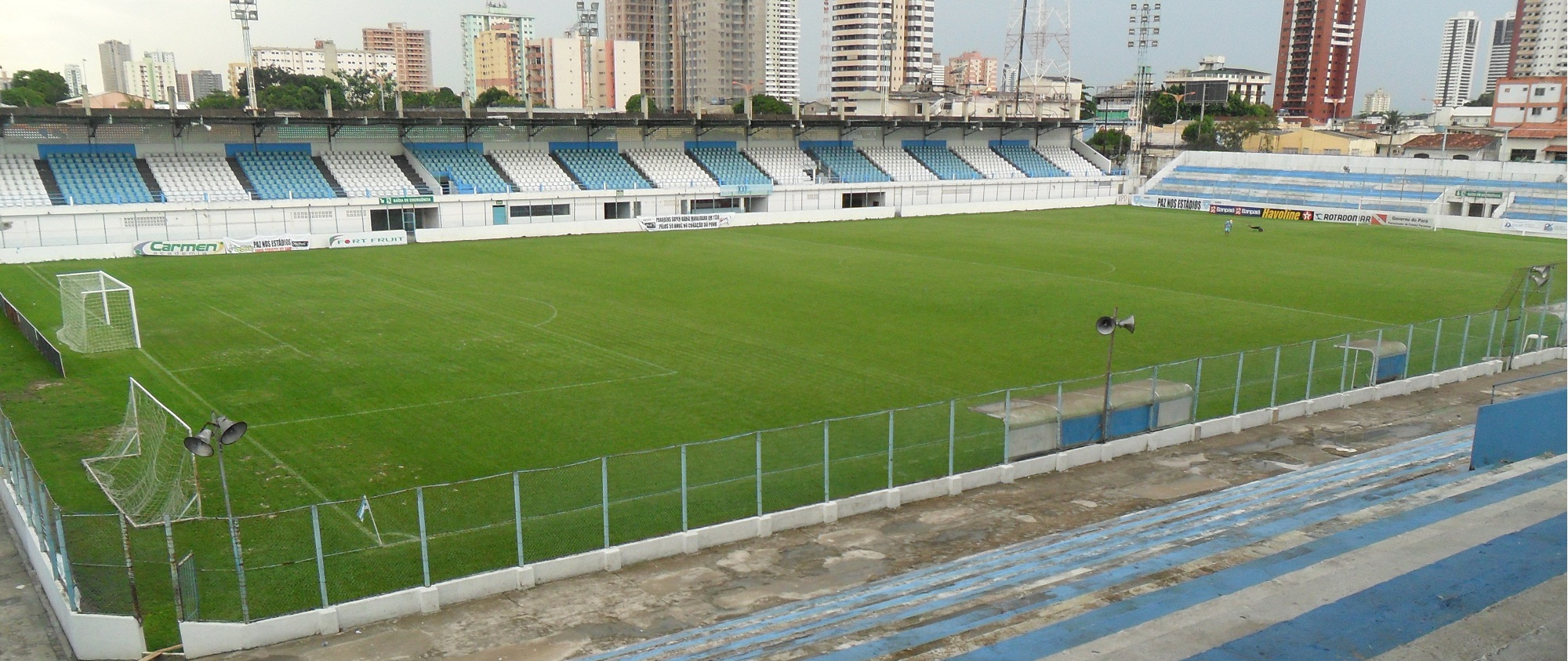 Visão Geral do Estádio